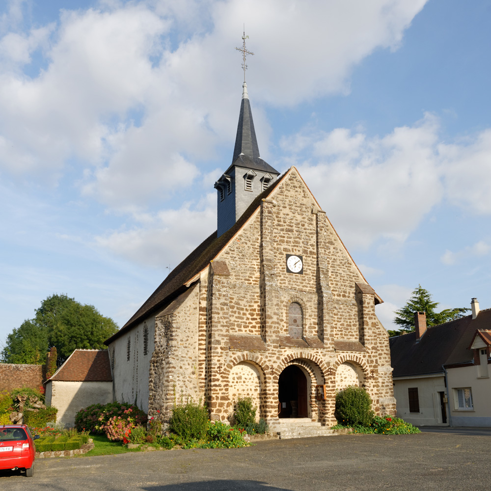 Église Saint-Loup-Saint-Gilles de La Fontenelle .